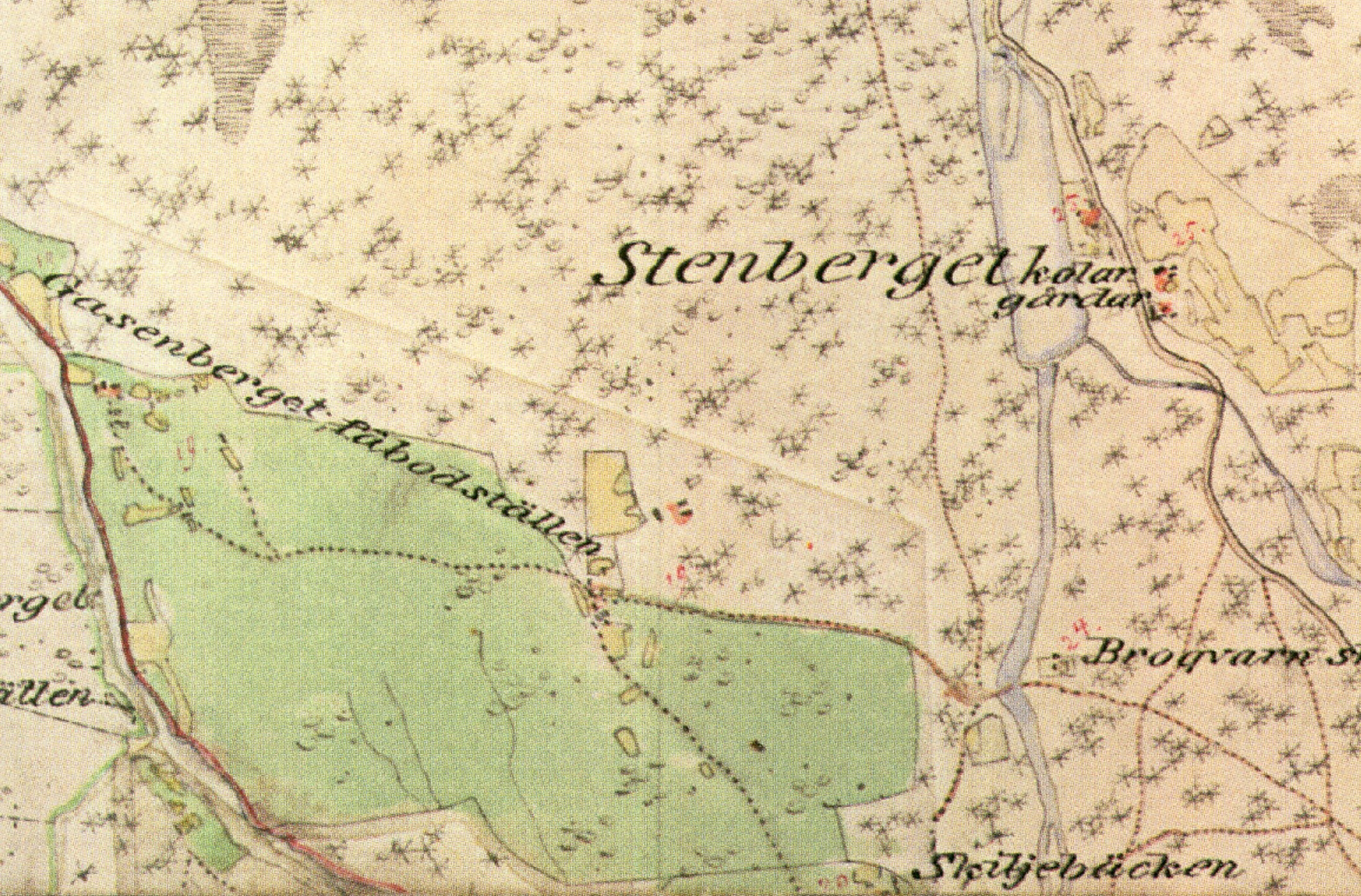 Del av Härardskarta Kullen/Stenberget